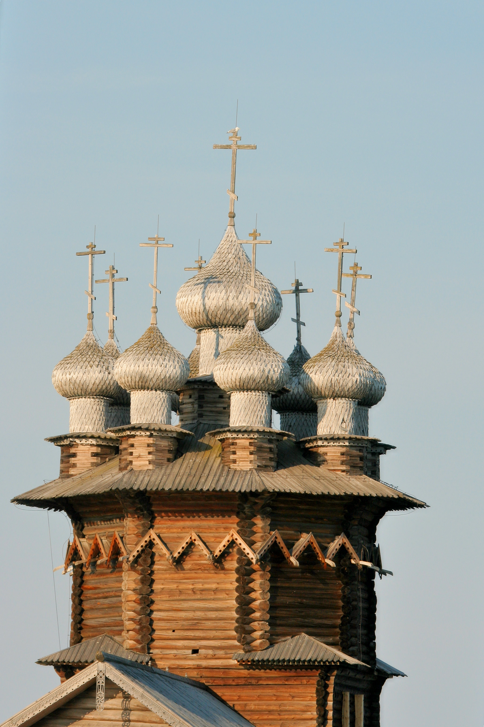 Der Turm der Winterkirche (!) auf der Insel Kischi